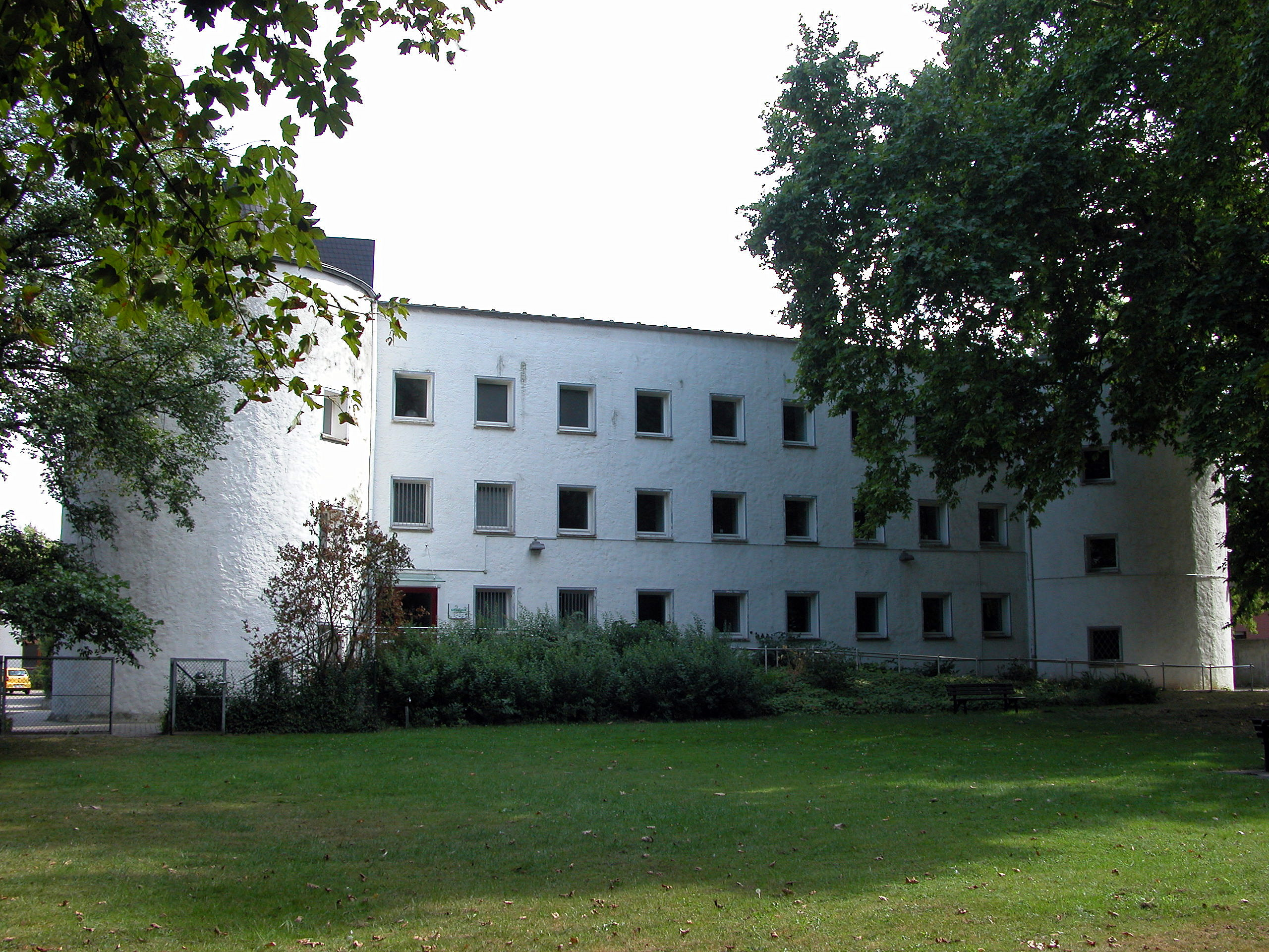 Braunschweig: Ehemaliger Bunker Rehnstoben.